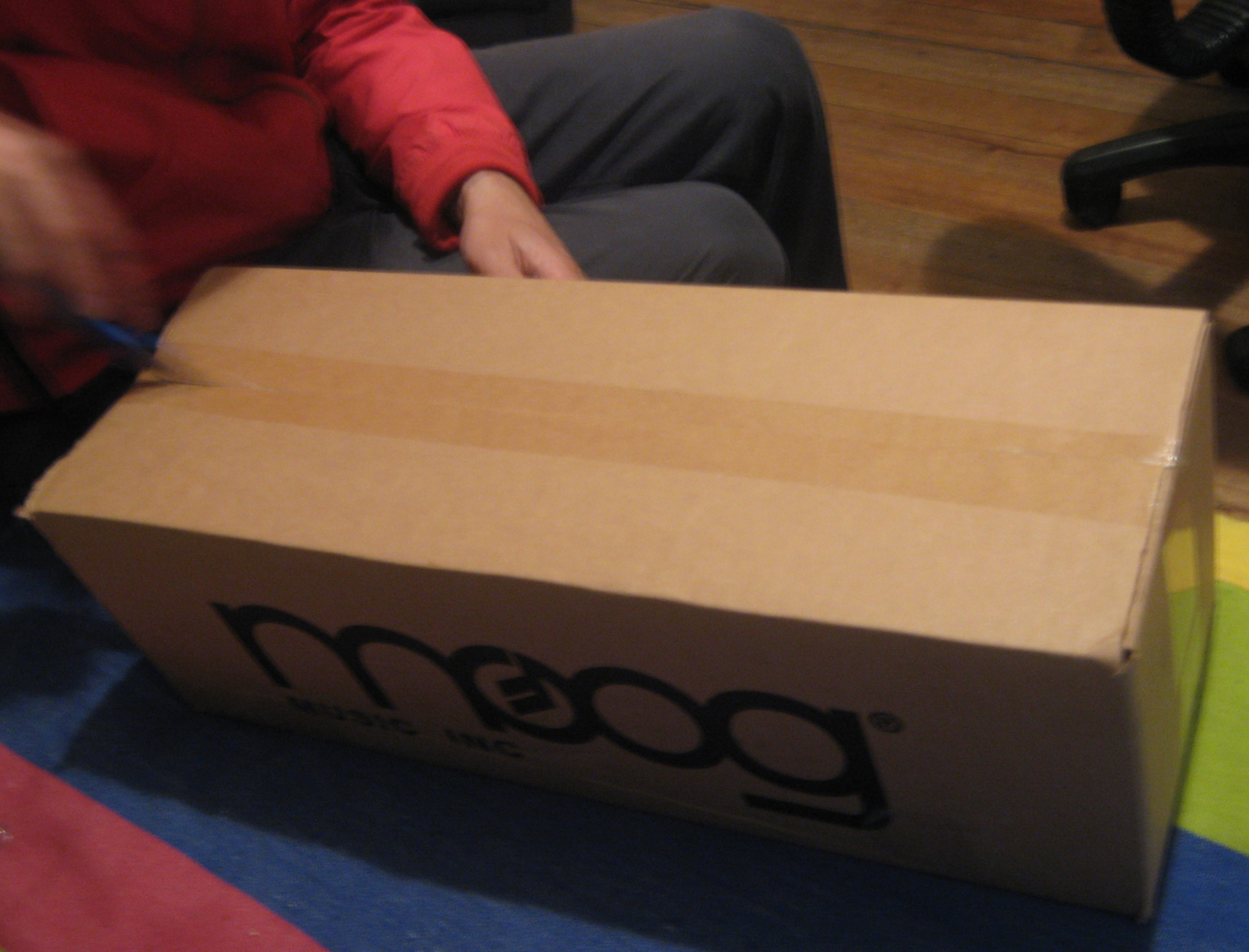 cortando el sello